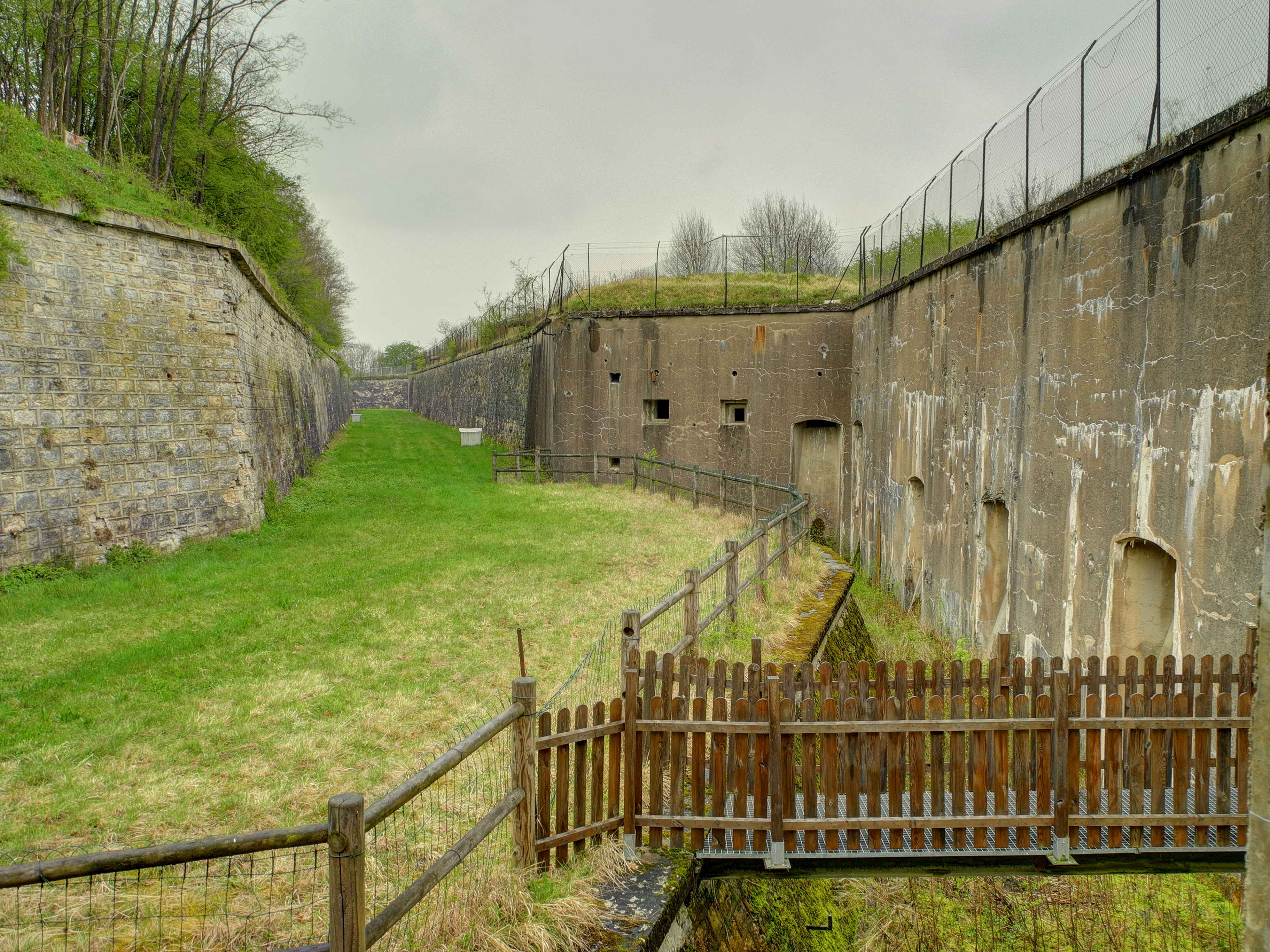 Fort de Vézelois : vue depuis le coffre de contrescarpe double, en direction du Nord (HDR).